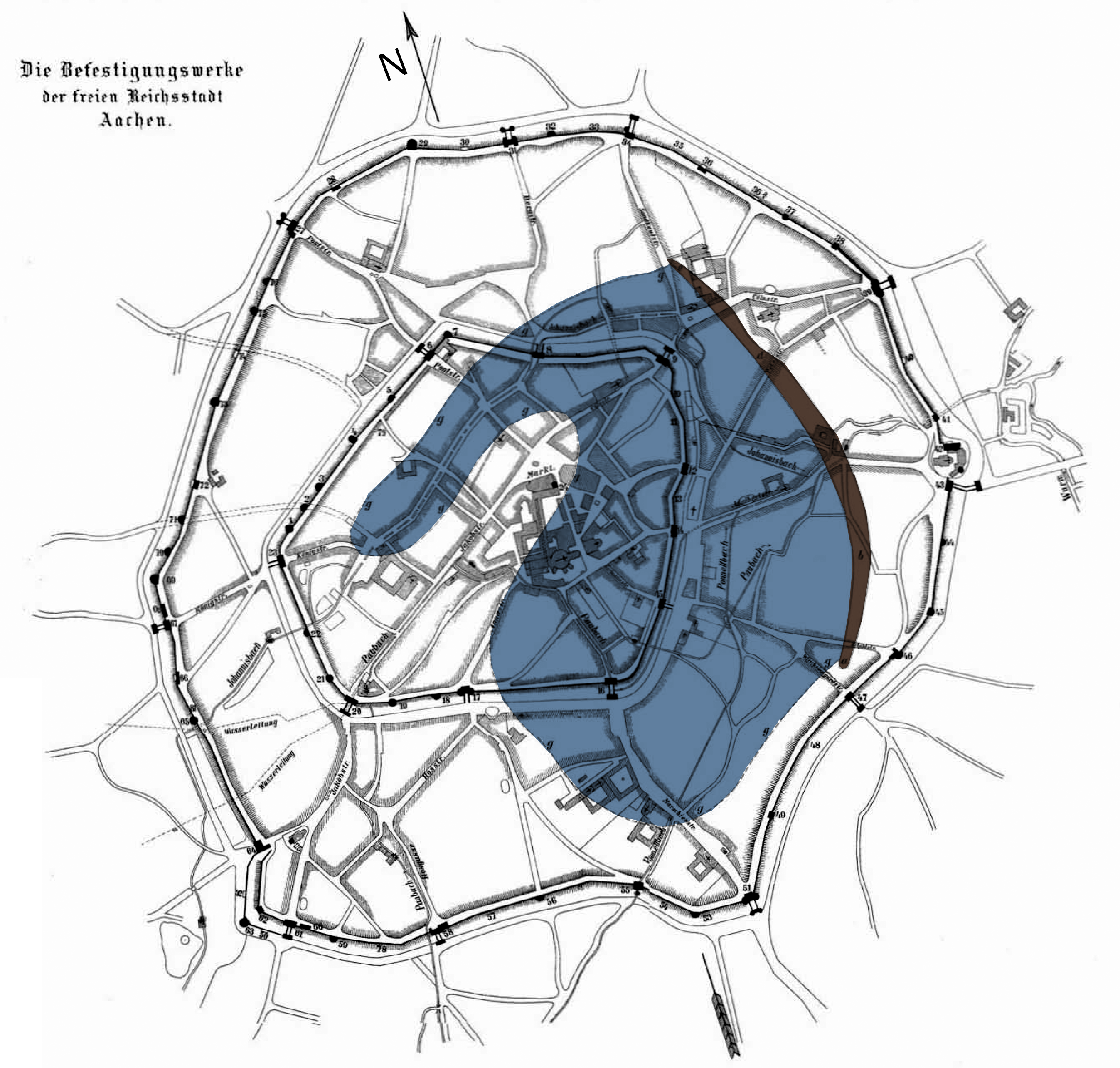 Stadplan des historischen Aachens mit Damm (braun) und durch den Wasserrückstau überflutetem Stadtgebiet (blau) bei der Belagerung der Stadt durch Wilhelm von Holland 1248